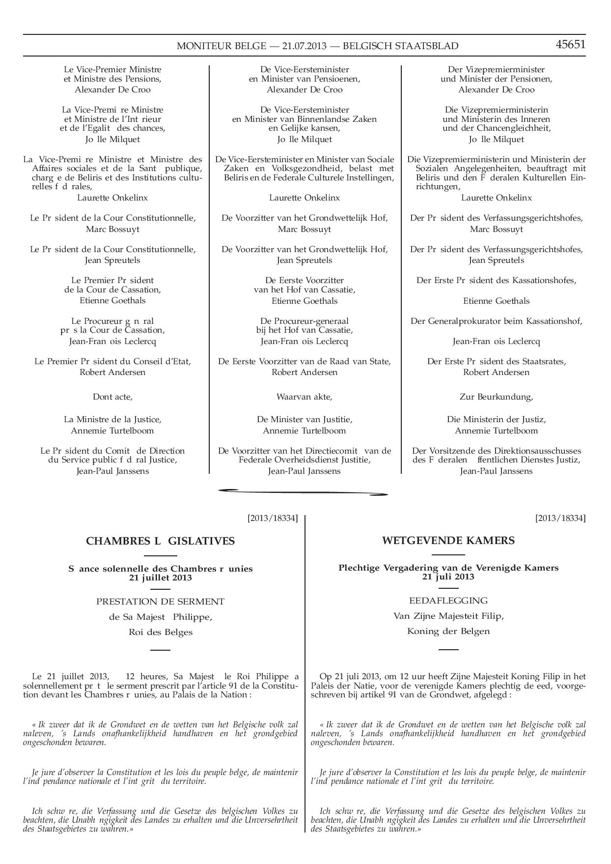 Belgisch Staatsblad Moniteur belge 21.07.2013